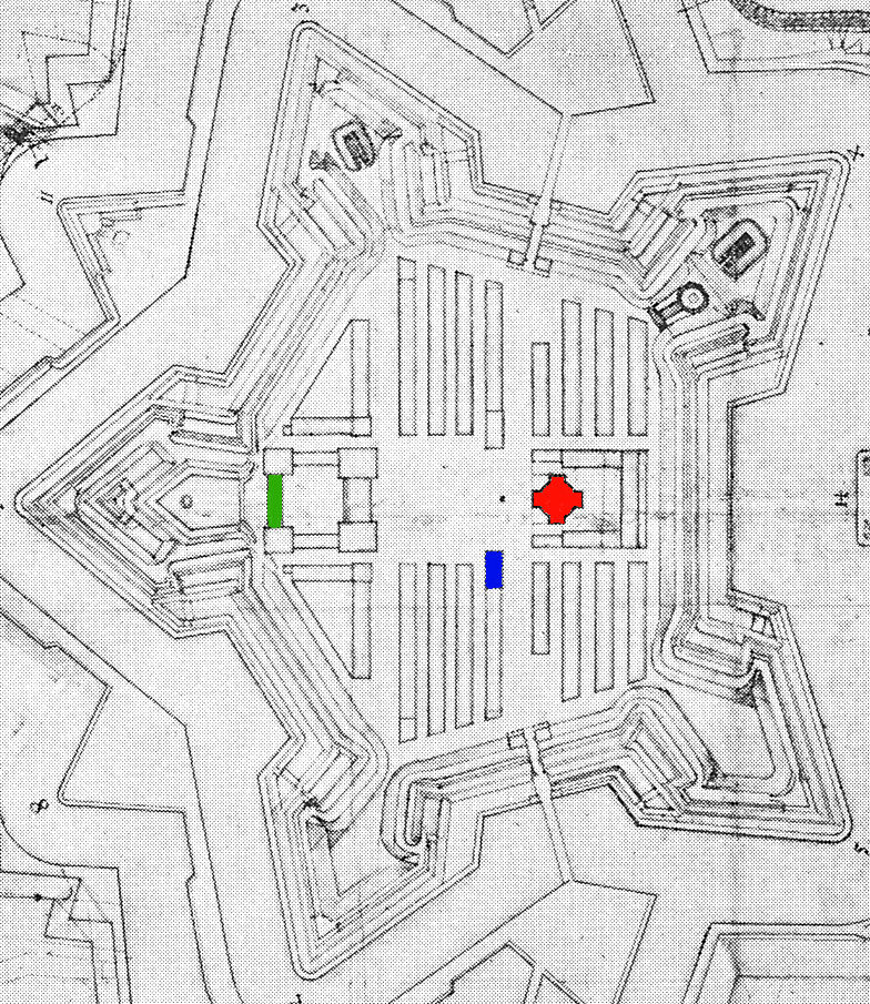 Kastelskirken (Citadel Church), Copenhagen, Denmark. Original plan by Hendrick Ruse, 1661.